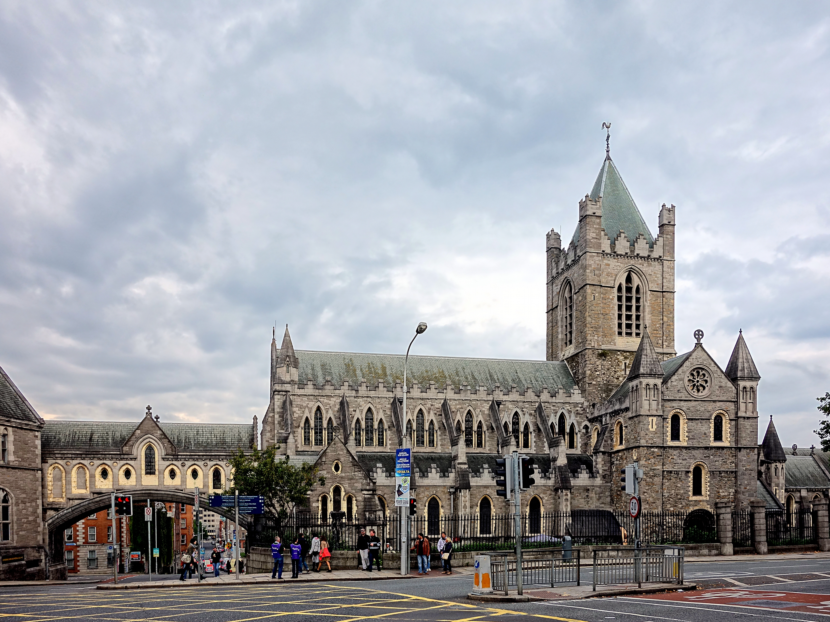 Christ Church Cathedral, Dublin.